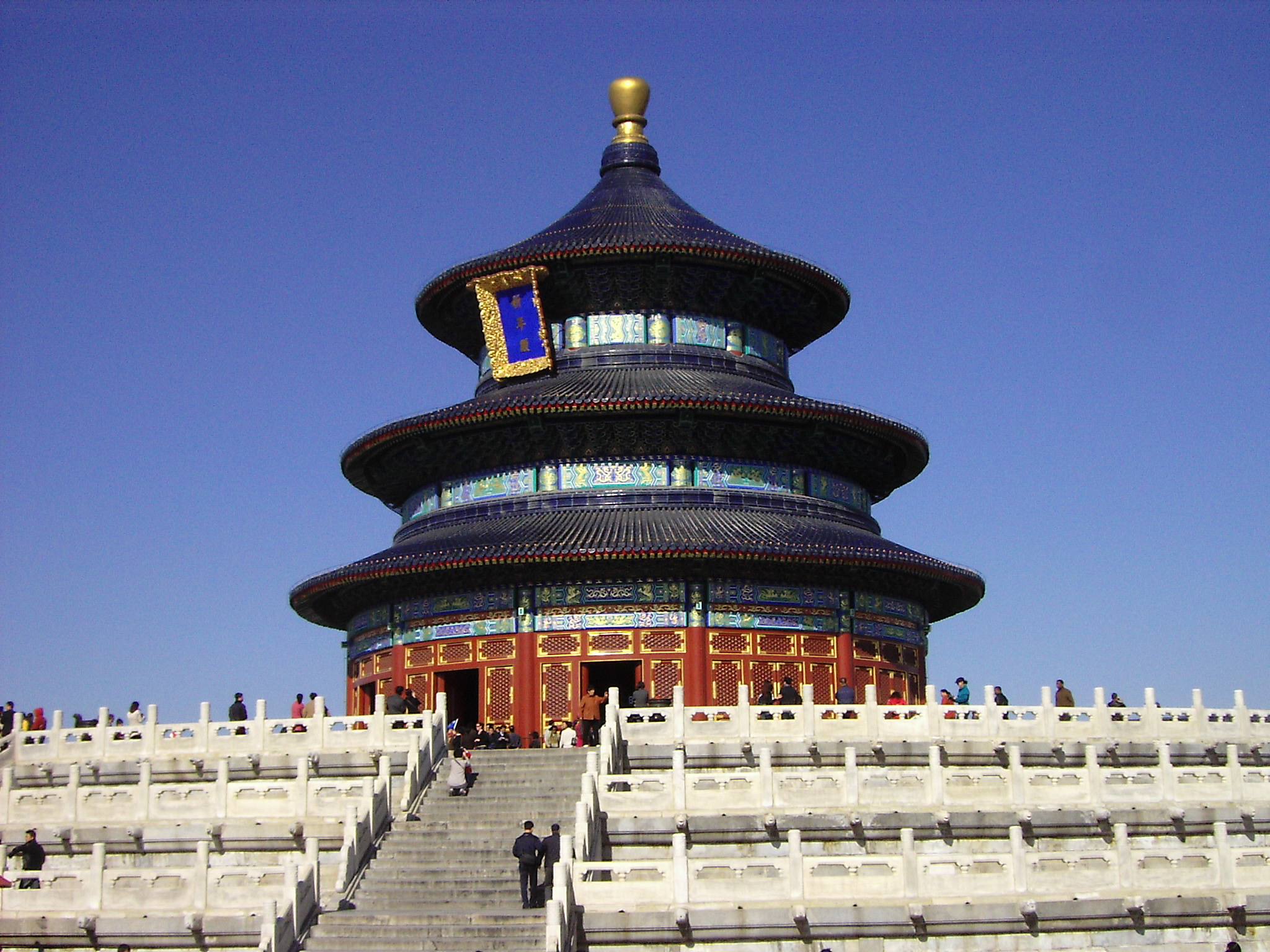 天坛